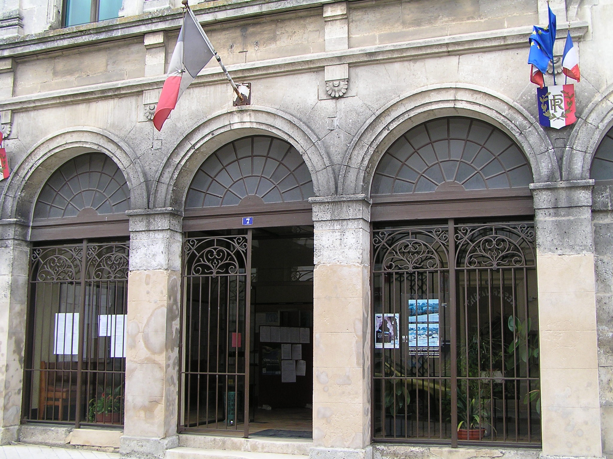 mairie de Rouillac